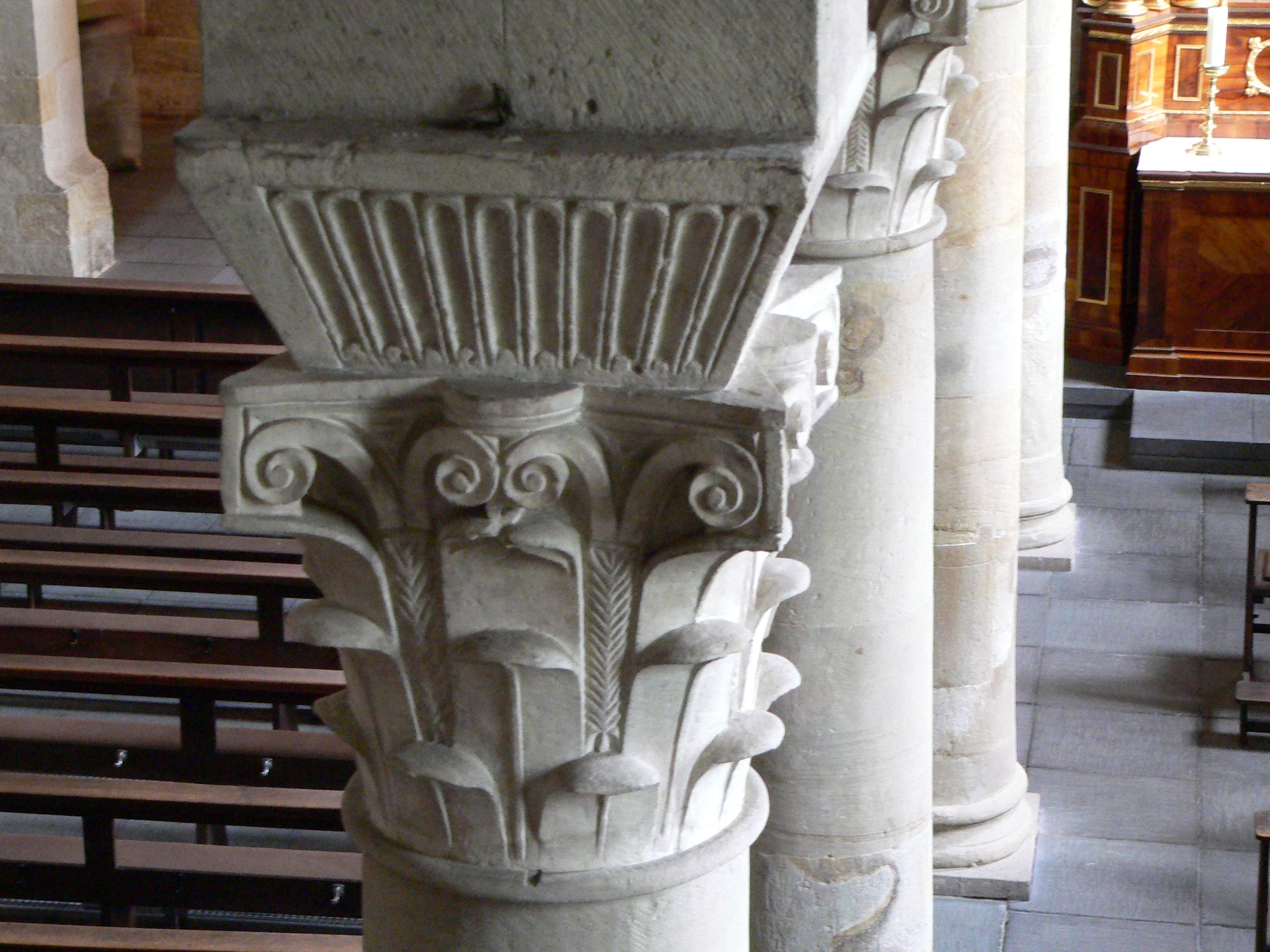 Karolingisches Kapitell in korinthischer Ordnung mit Kämpferaufsatz in der Justinuskirche, Frankfurt-Höchst